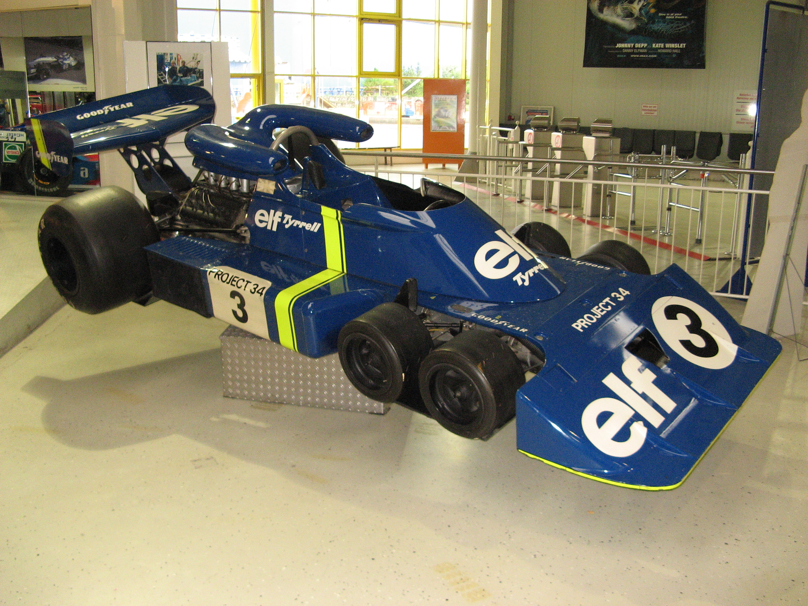 Formula 1, Tyrrell P34, 6 wheel, Driver: Jody Scheckter, Patrick Depailler, Exhibition: Technik-Museum Sinsheim, Germany